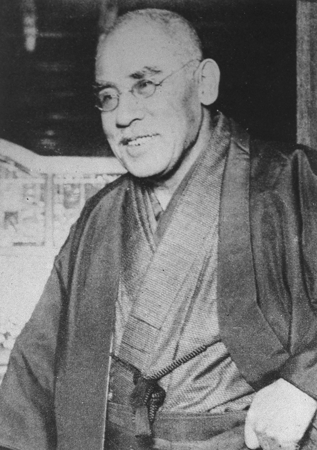 Portrait of Kato Takaaki (加藤高明, 1860 – 1926)